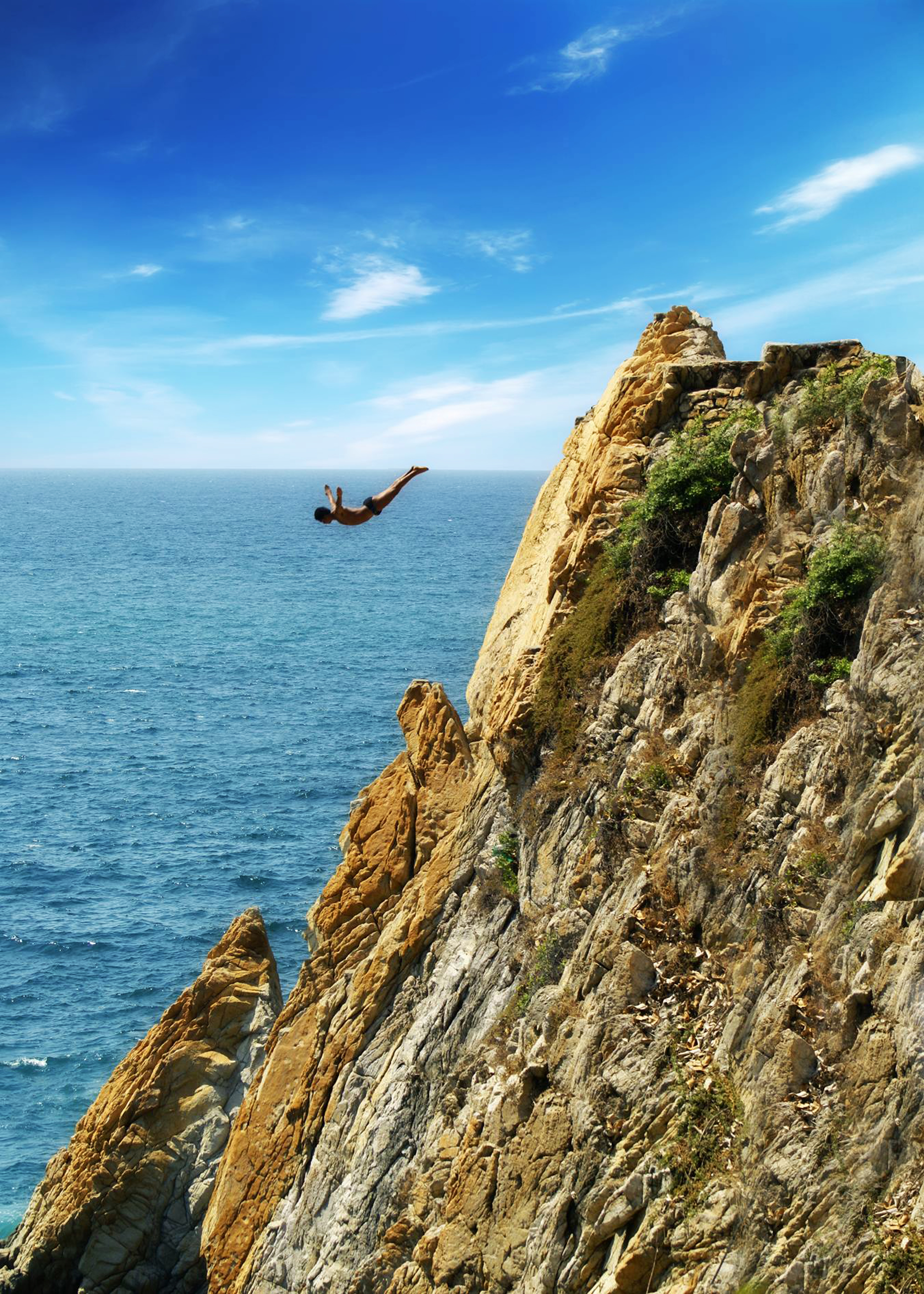 La Quebrada, Acapulco, Guerrero